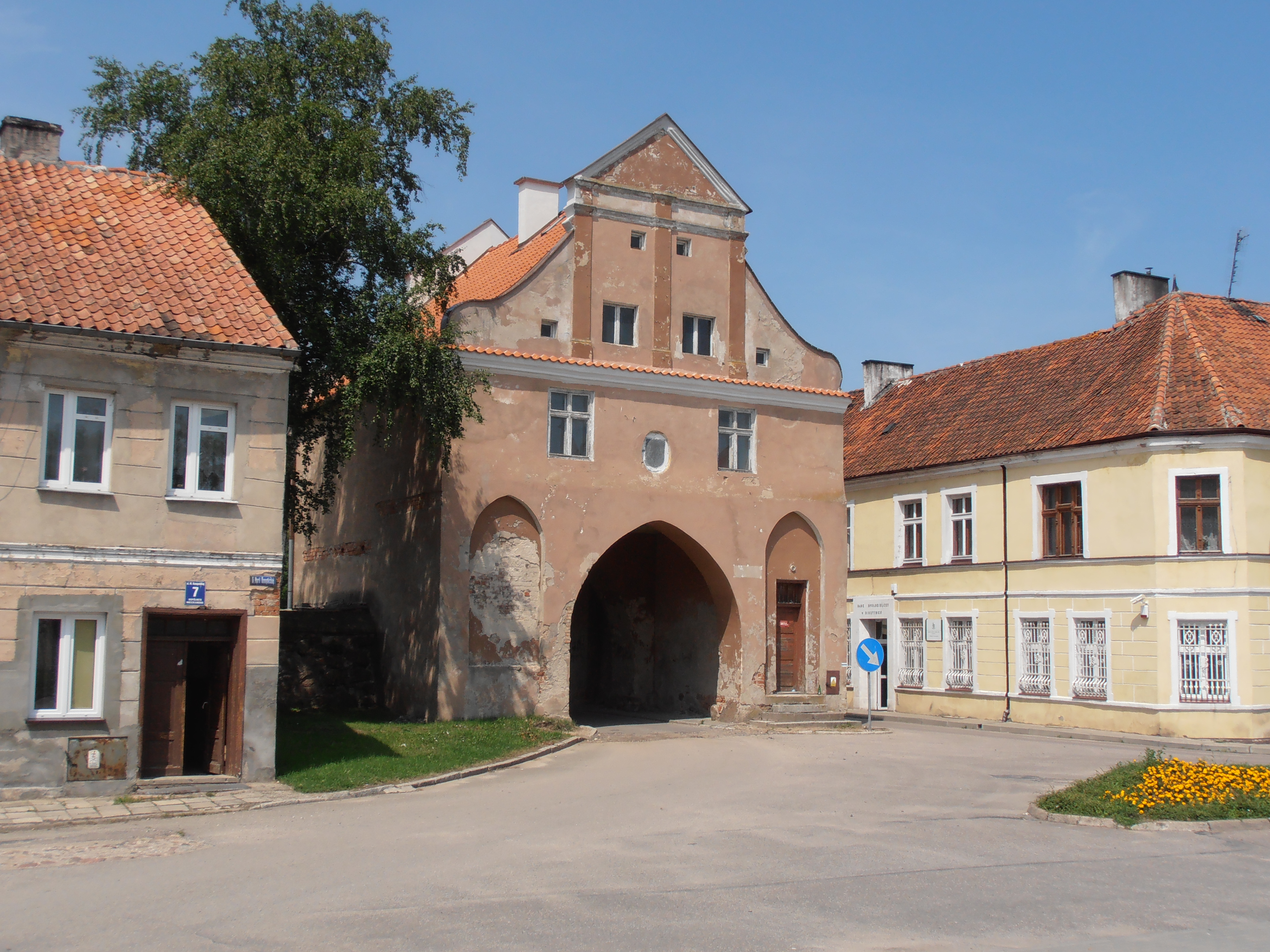 Brama Lidzbarska w Bisztynku